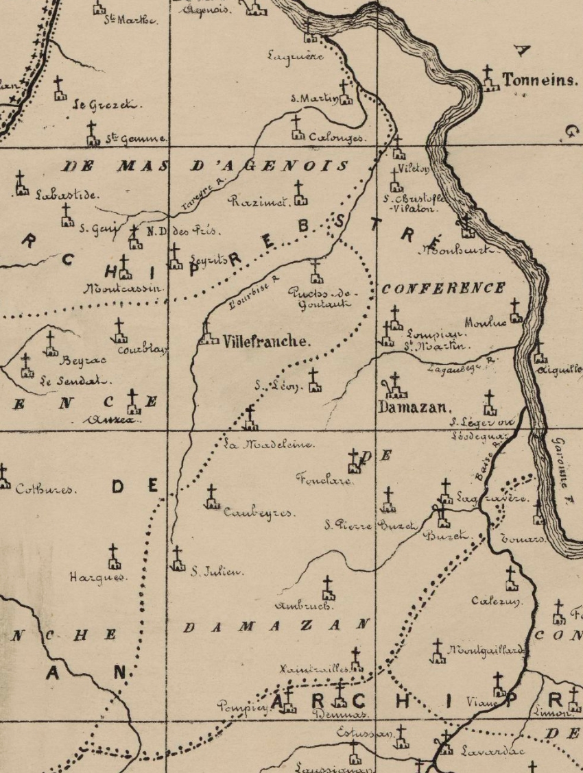 Extrèit de la mapa de la diocèsi de Condòm: Jean-Marie Cazauran (1845-1910). Diocèse de Condom au XVIIe siècle.